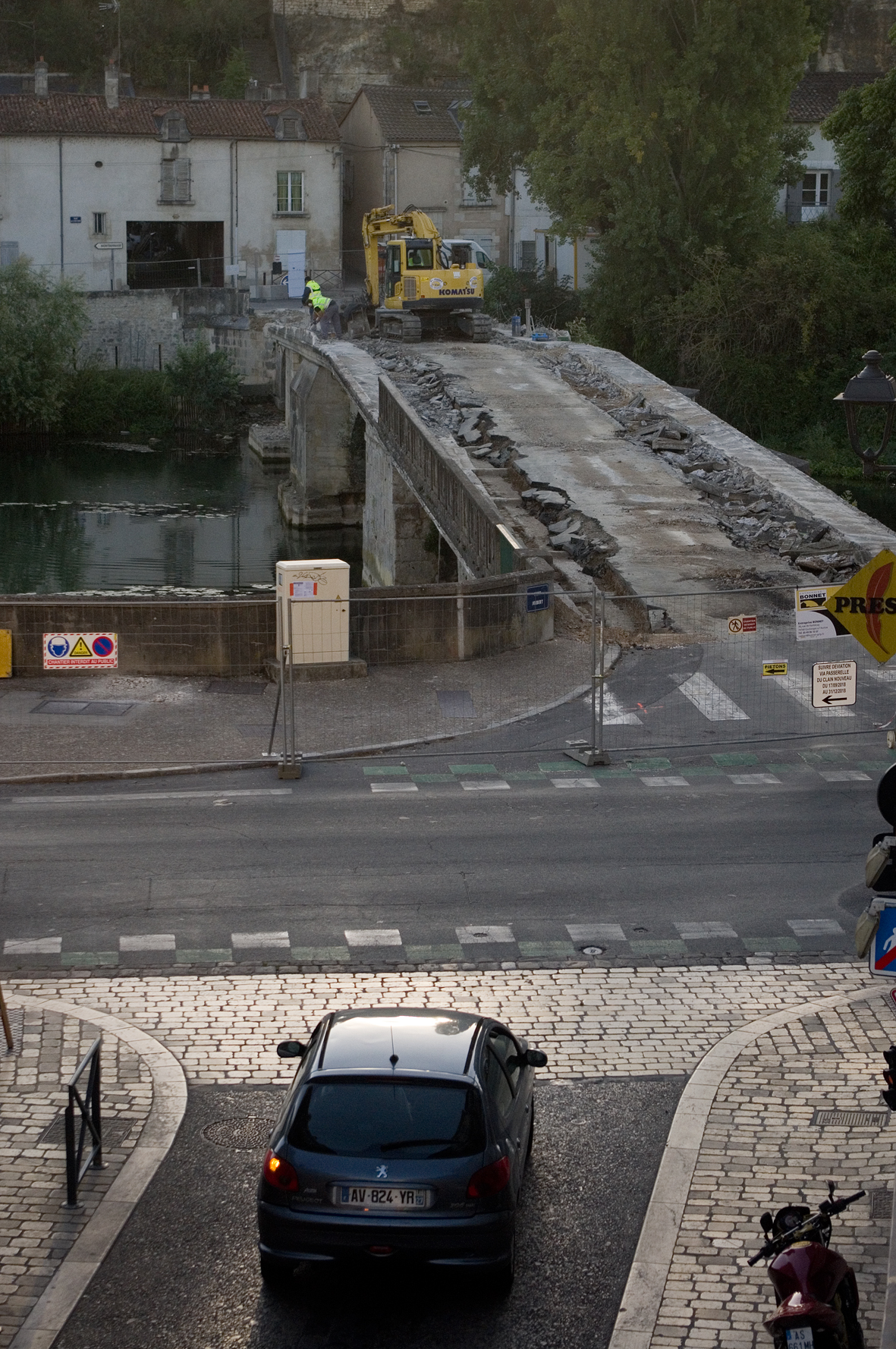 Poitiers démolition du tablier et des parapets du Pont-Joubert 26 septembre 2018